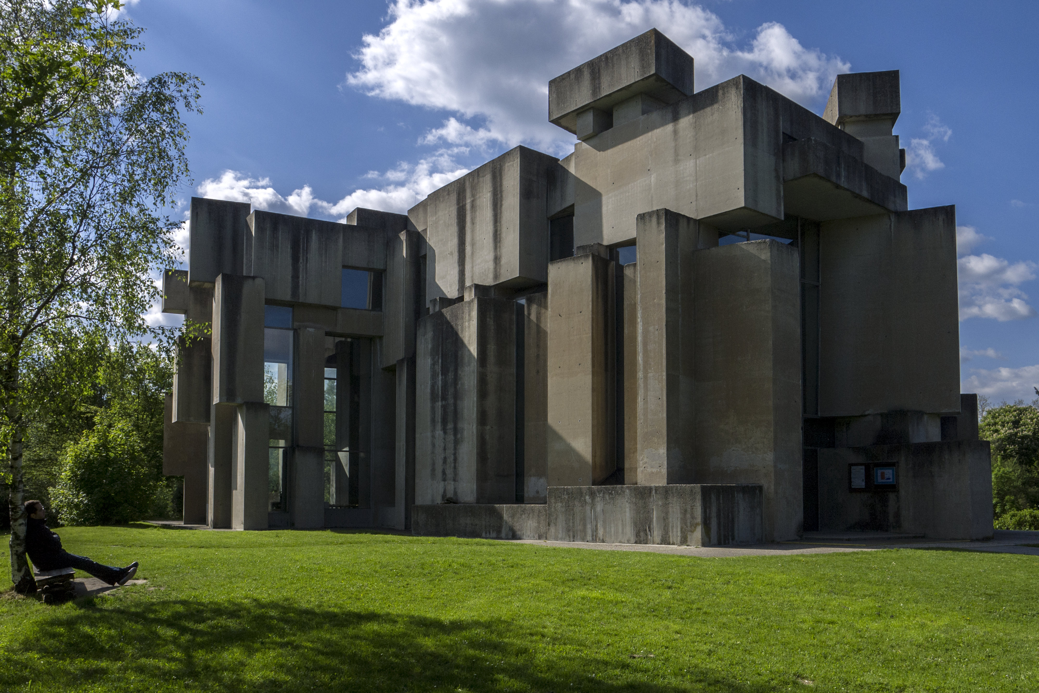 Kath. Filialkirche, Zur hl. Dreifaltigkeit, sogenannte "Wotruba-Kirche"